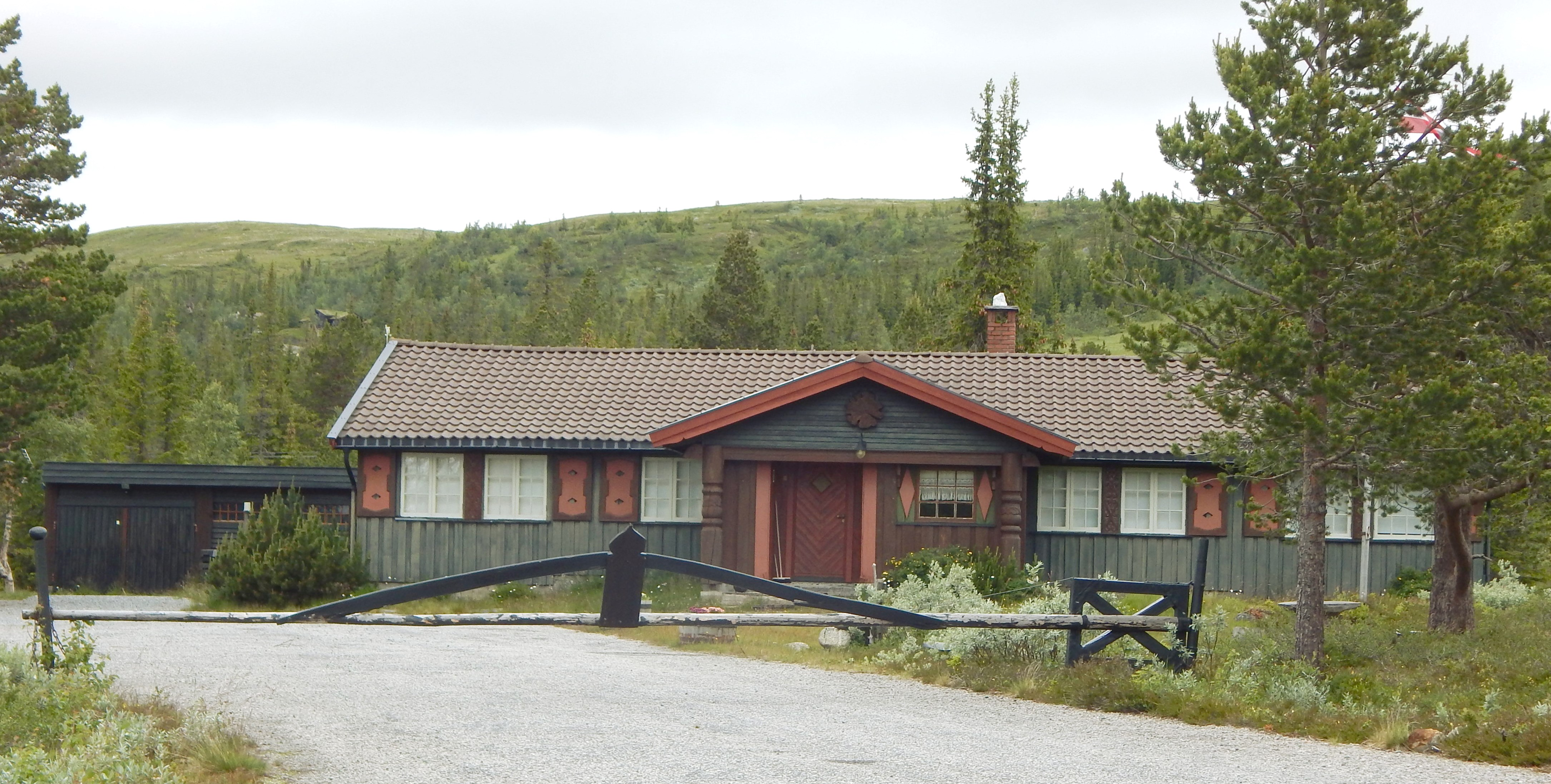 Skjervedalen fjellstue